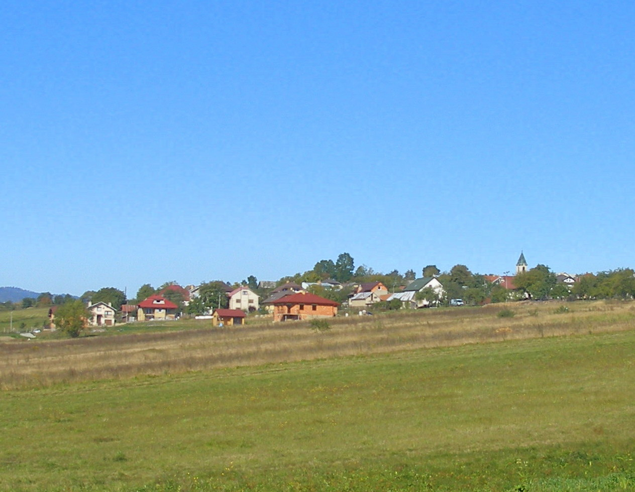 Obec Janovce okres Bardejov.